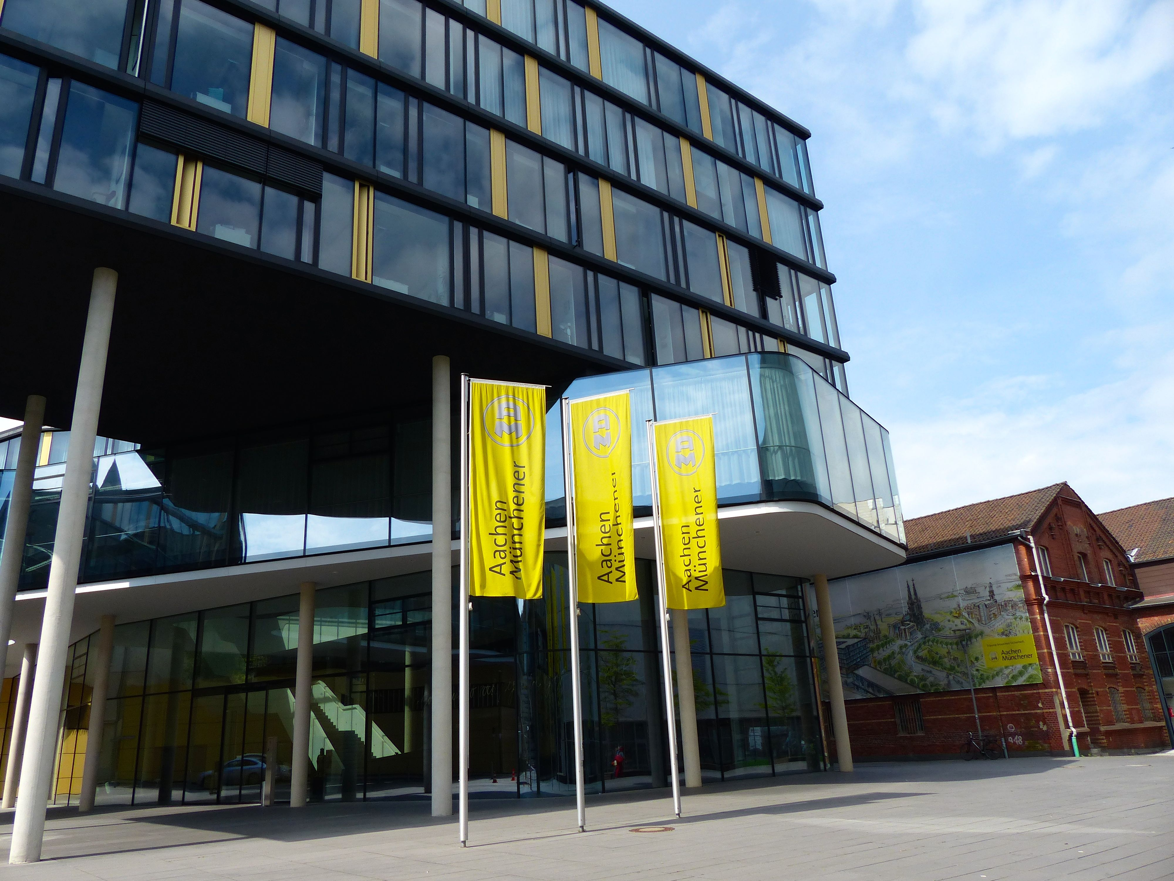 Direktionsgebäude der AachenMünchener Versicherung in Aachen; (Kadawittfeldarchitektur, 2010)